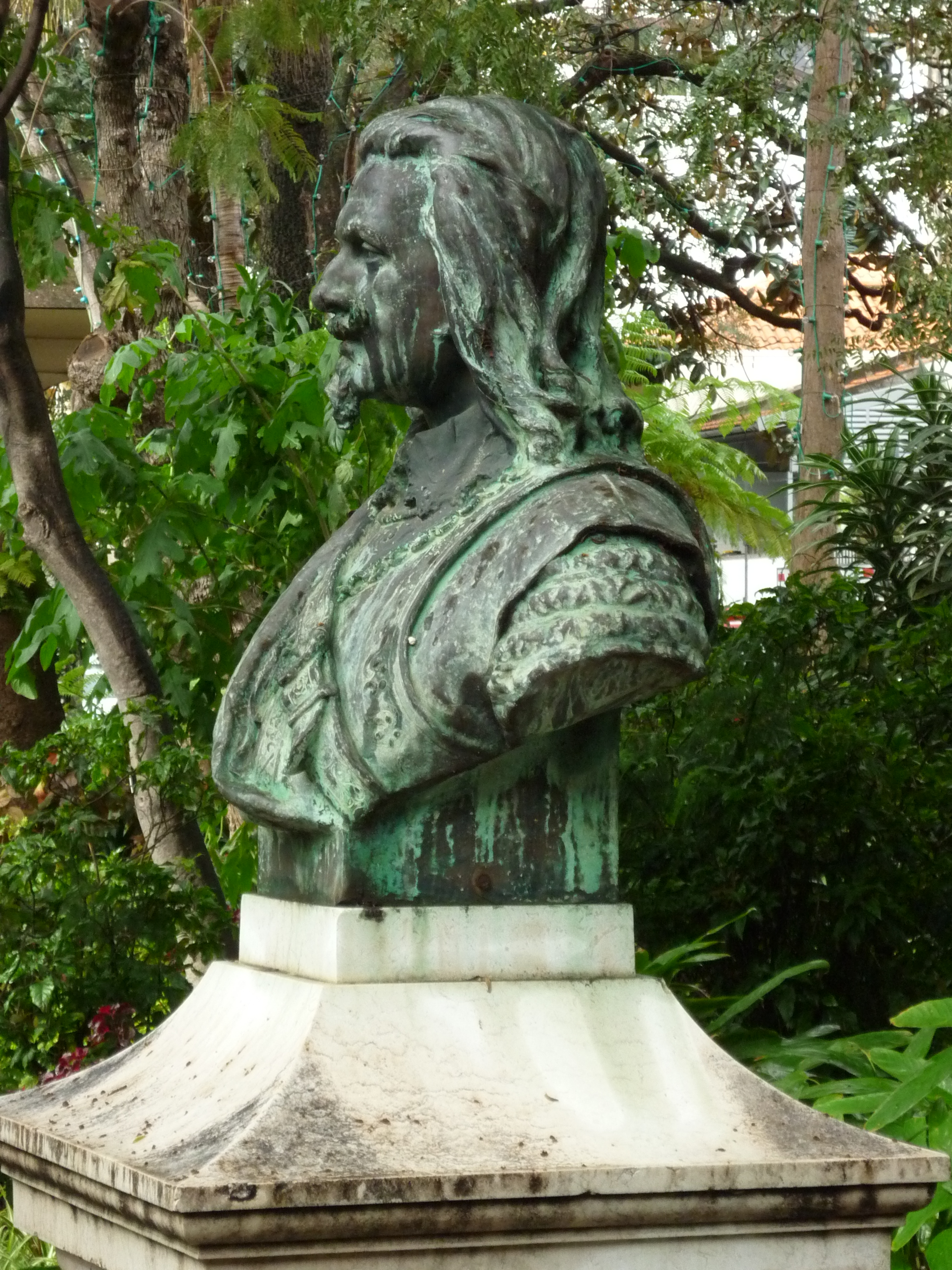 João Fernandes Vieira mellszobra Funchalban, a Városi kertben (Costa Mota alkotása, 1925)